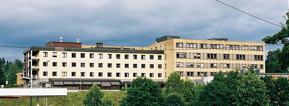 Kongsberg sykehus.